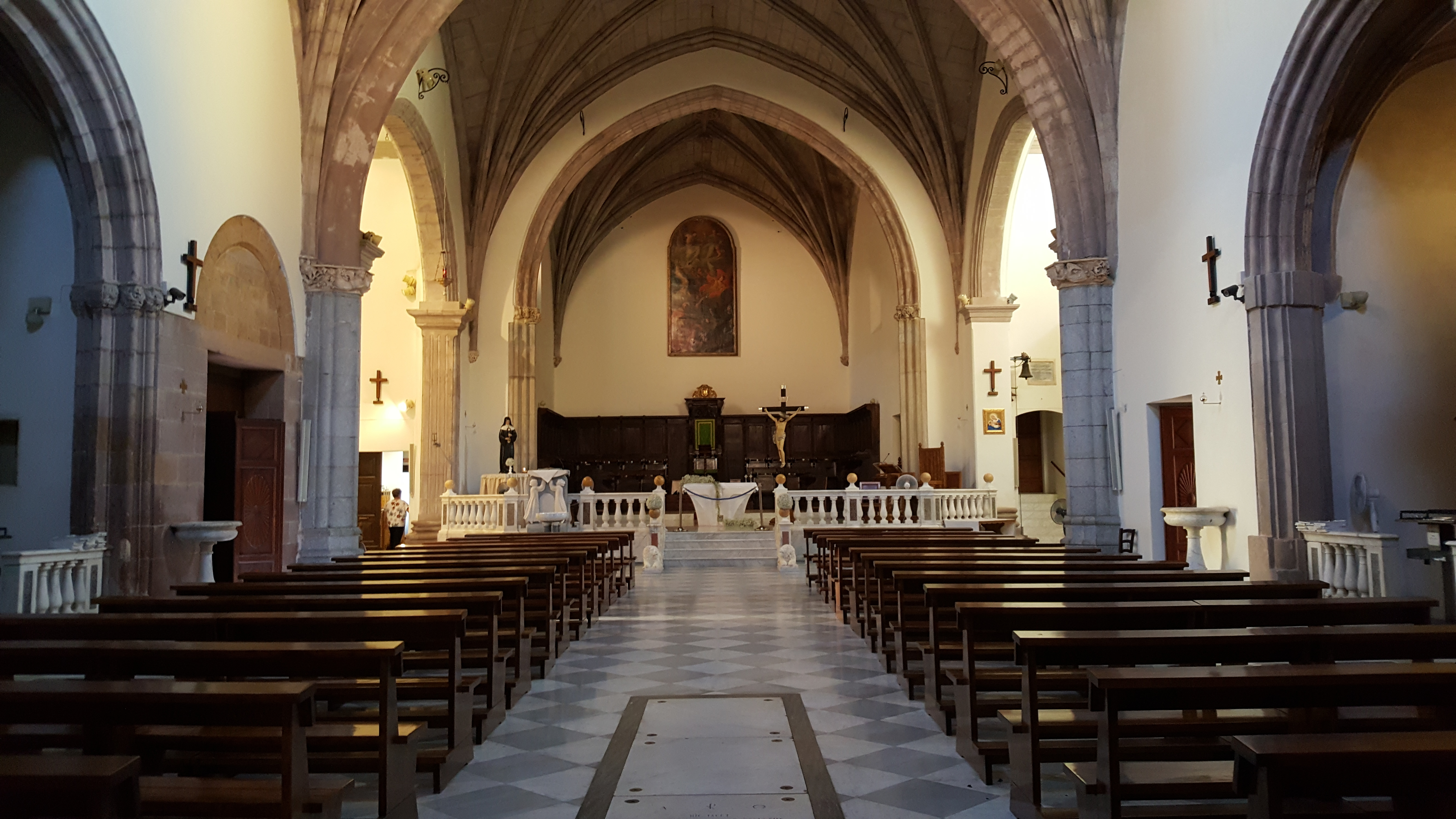 L'interno della Cattedrale di Santa Chiara ad Iglesias. Si possono notare le entrate delle cappelle laterali e il coro dei canonici presente sul presbiterio. Quest'ultimo un tempo era occupato da un altare marmoreo di gusto neoclassico costruito da Andrea Ugolini nel 1861 e rimosso per motivi liturgici e architettonici nel restauro degli anni 2000.